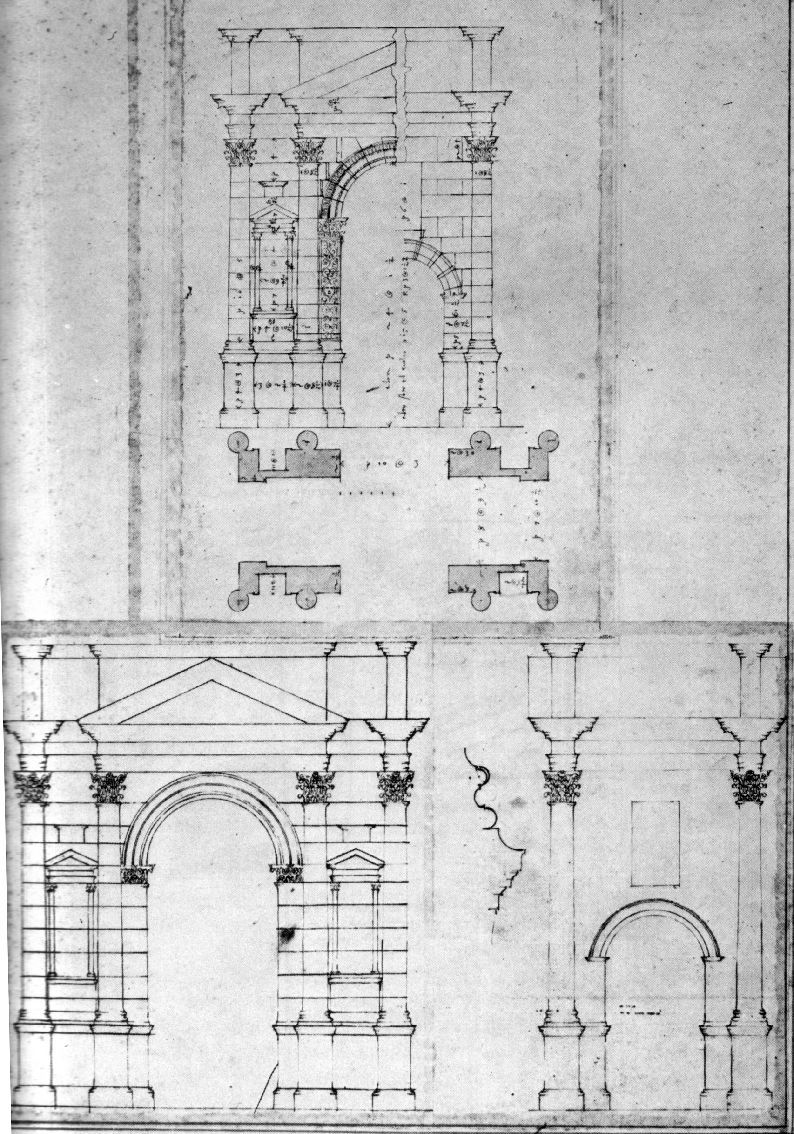 Andrea Palladio, Semiprospetti e prospetti e dettagli della decorazione architettonica dell'Arco dei Gavi, London, R.I.B.A., XII, 11r-11v (immagine tratta da Tosi 1983).